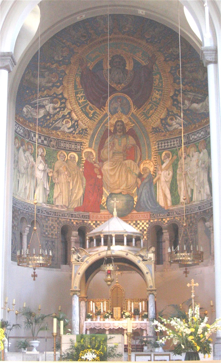 Pfarrkirche St. Anna in München, Hochaltar